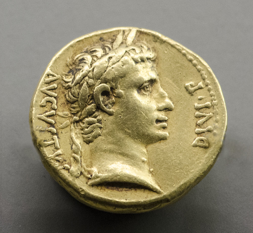 Moneda romana en plata de Augusto. Caius Iulius Caesar Octavianus Augustus nació en el año 63 a-C. y fue emperador entre el 27 a.C. y 14 d.C., año de su muerte. Fotografía tomada en vitrina a través del cristal.